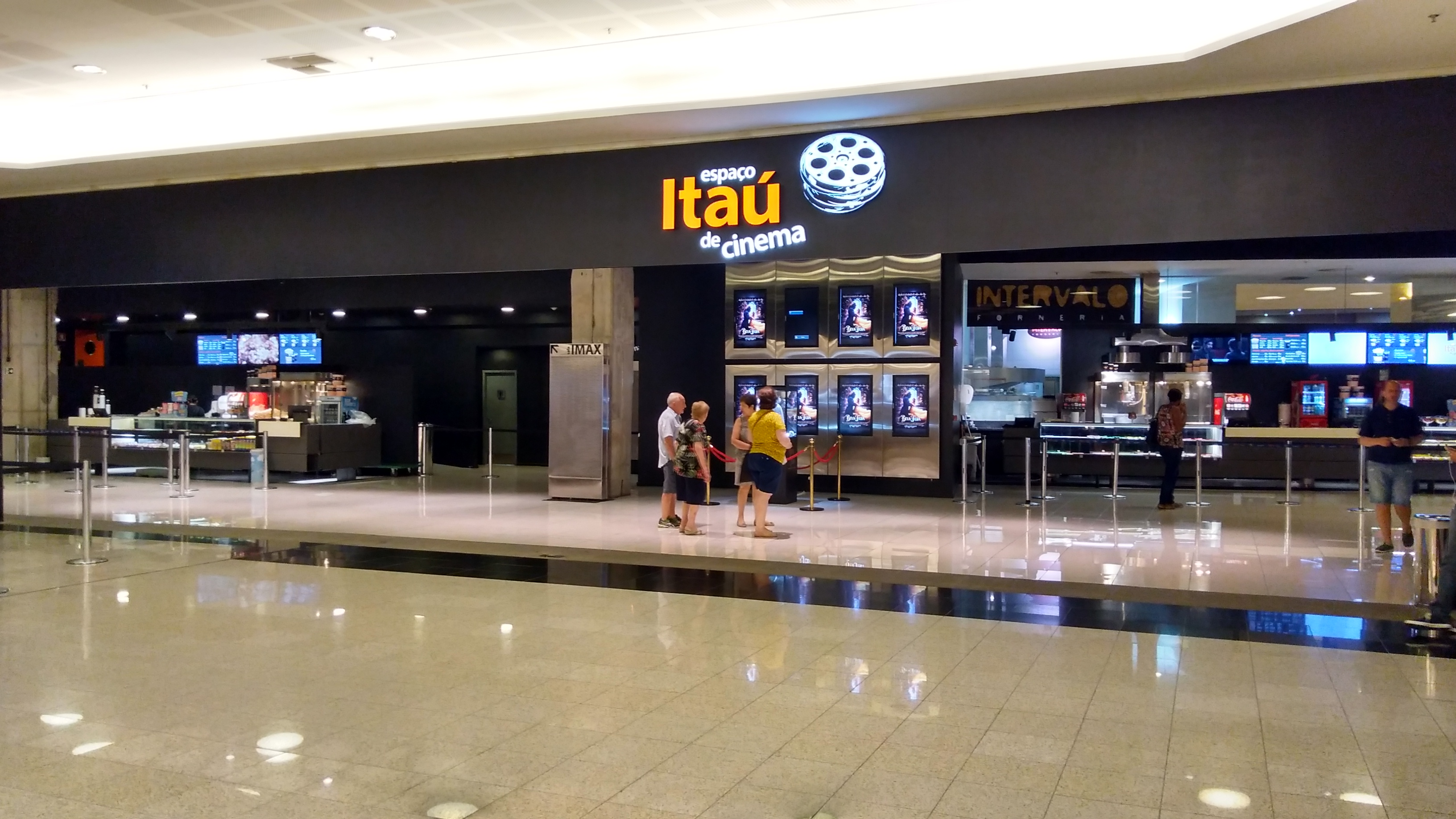 Vista da entrada do Espaço Itaú Bourbon Pompéia de São Paulo, SP